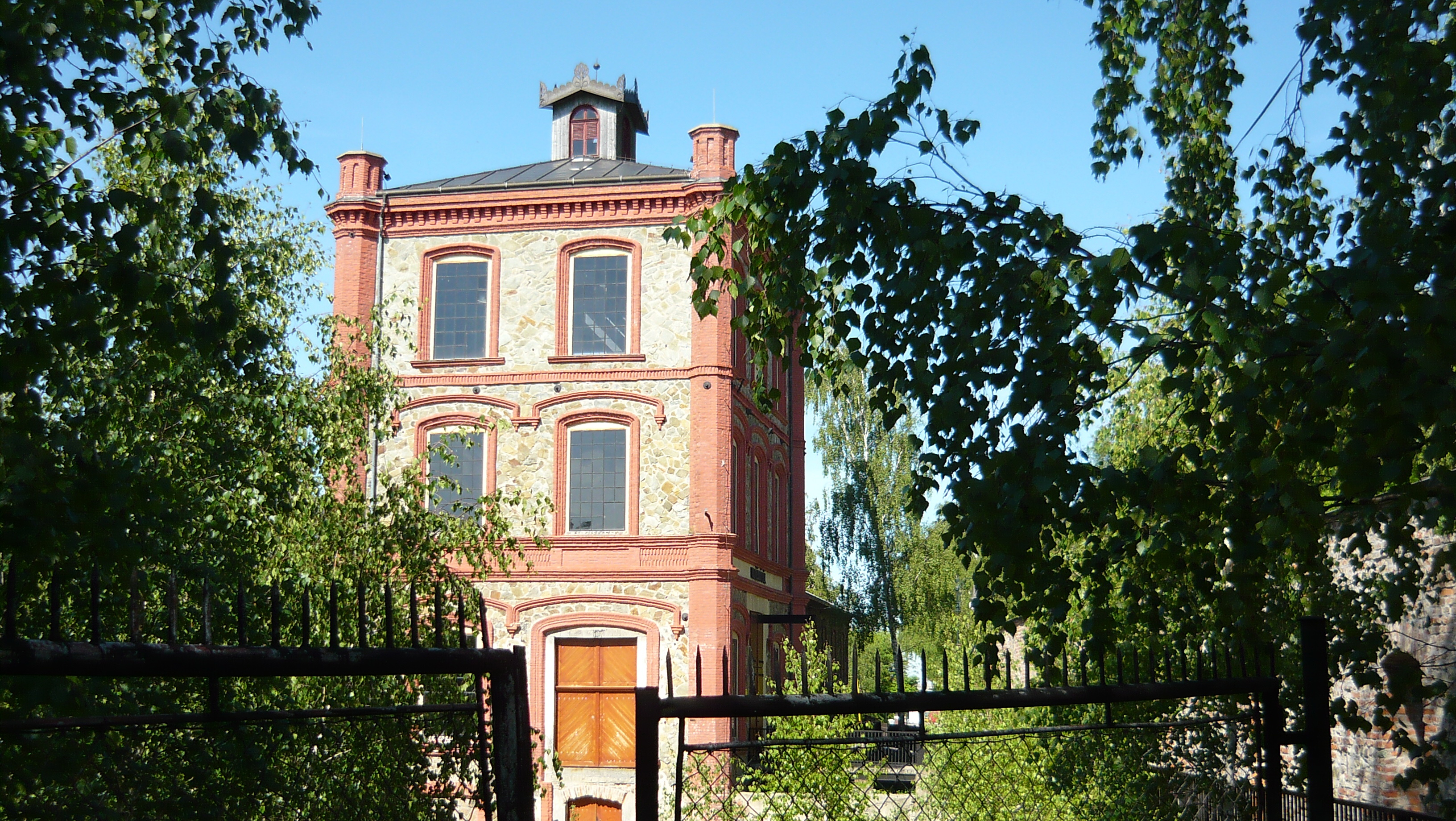 Pohled na Vojtěšský důl v Příbrami